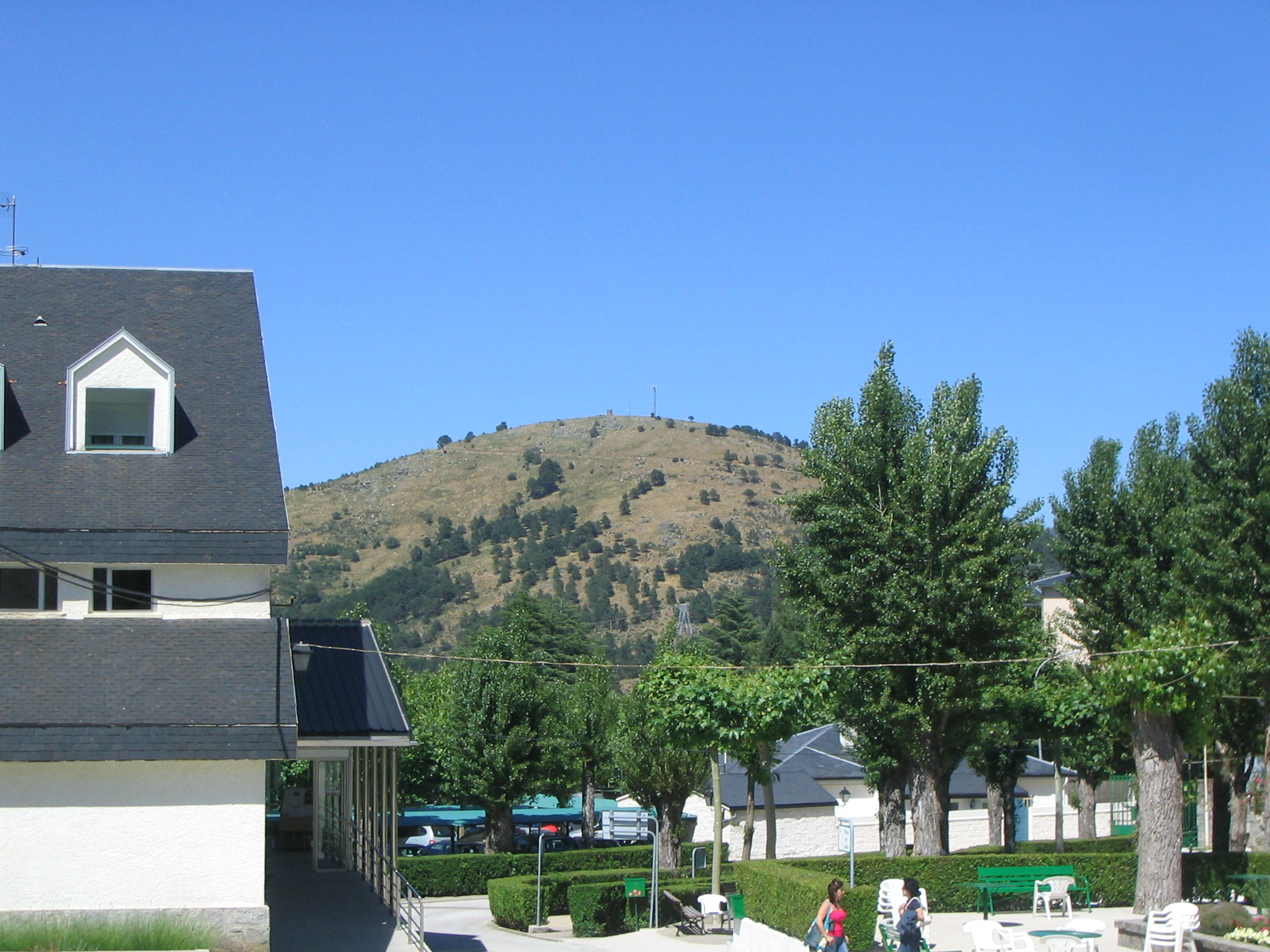 Monte Cabeza Reina. El Espinar, Segovia España.